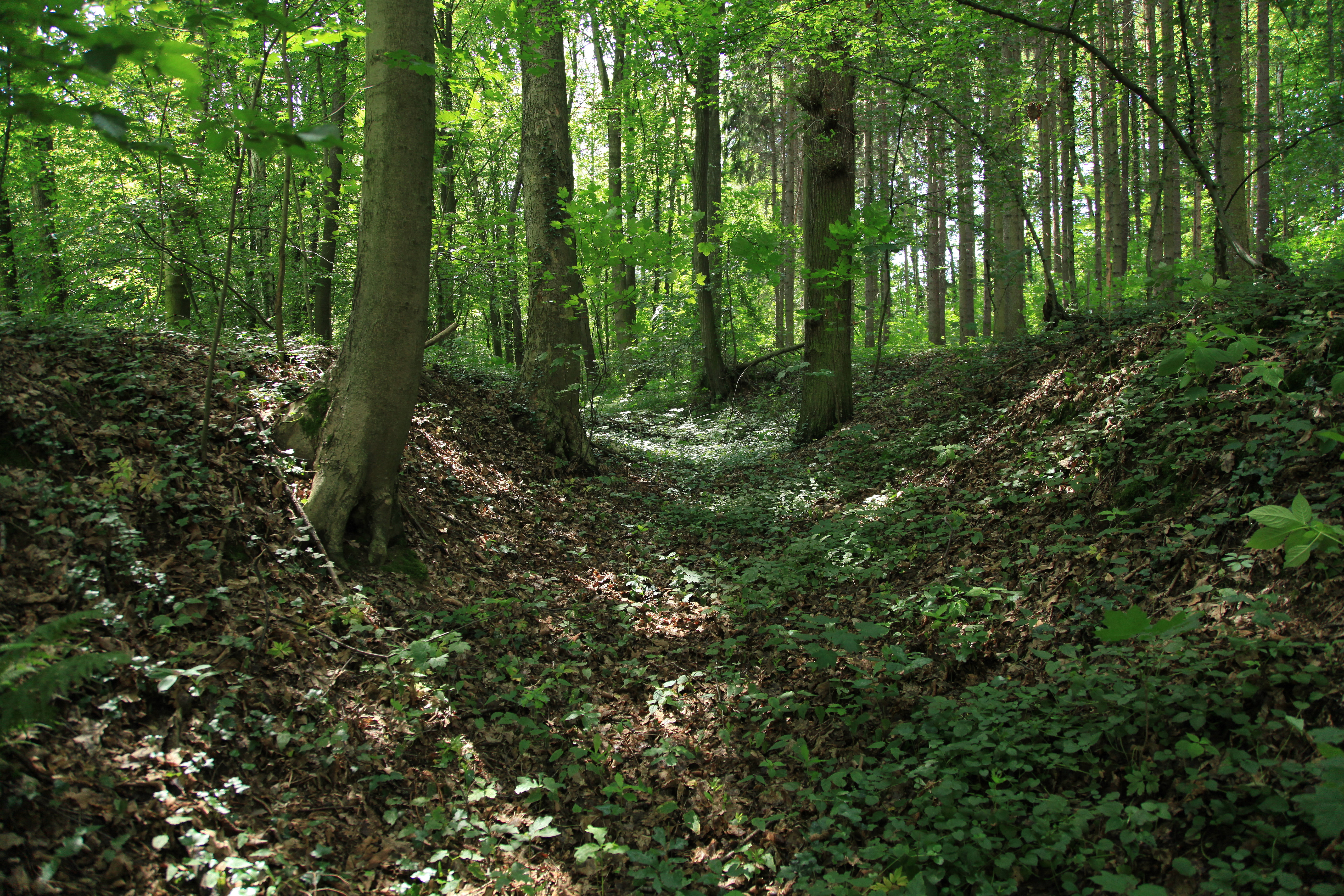 Strata antiqua Lusatiae in der Georgewitzer Skala in Löbau